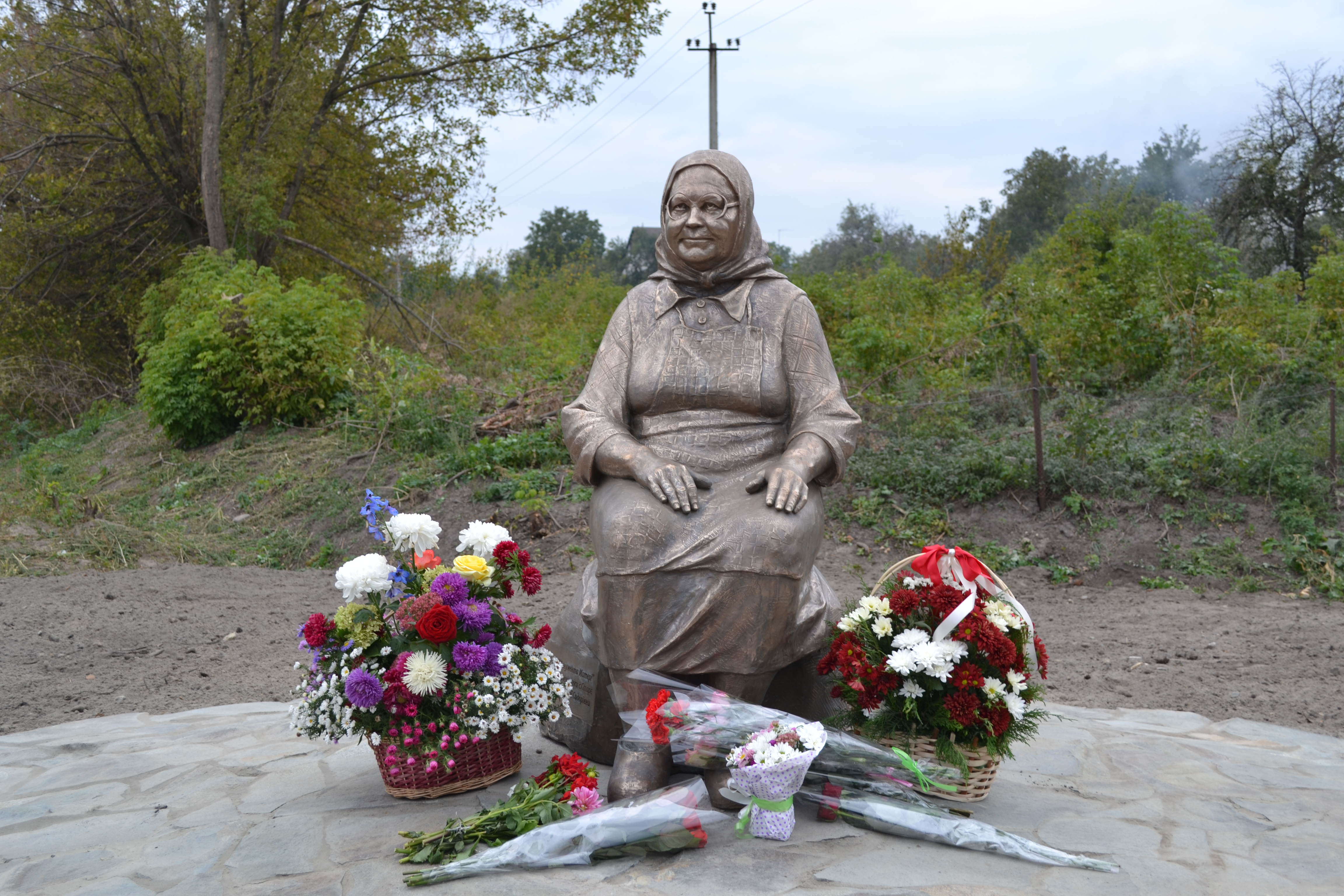 Монумент Матері Усі квіти до ніг матерів